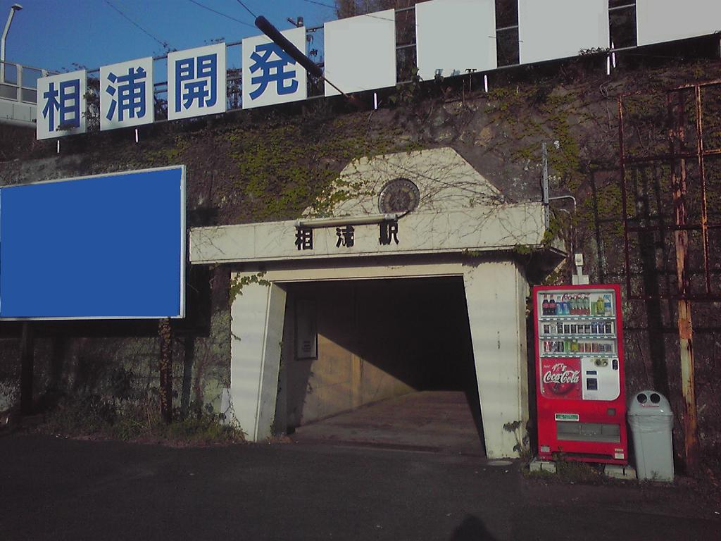 投稿者が2008年5月3日に撮影